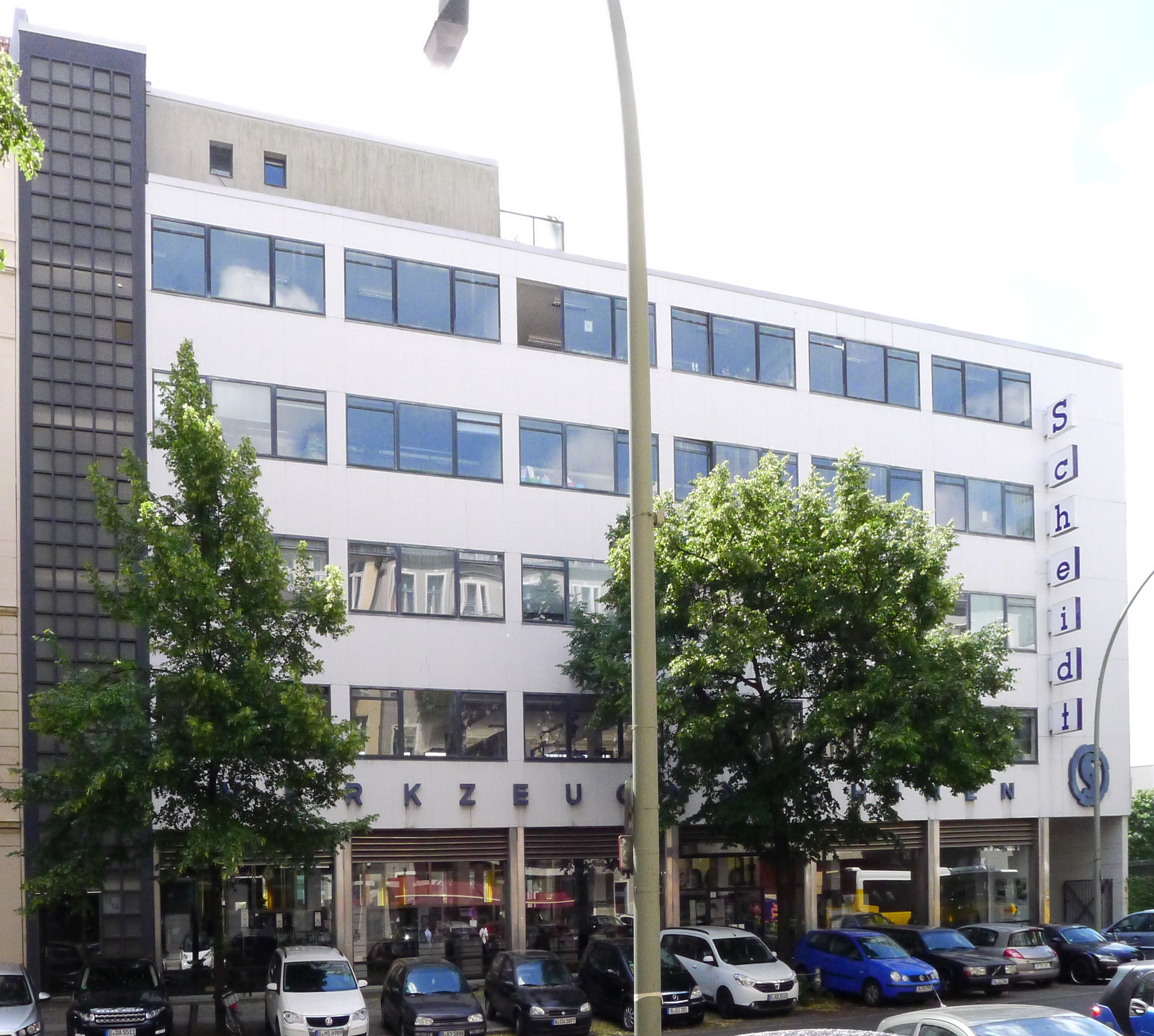 Geschäftshaus